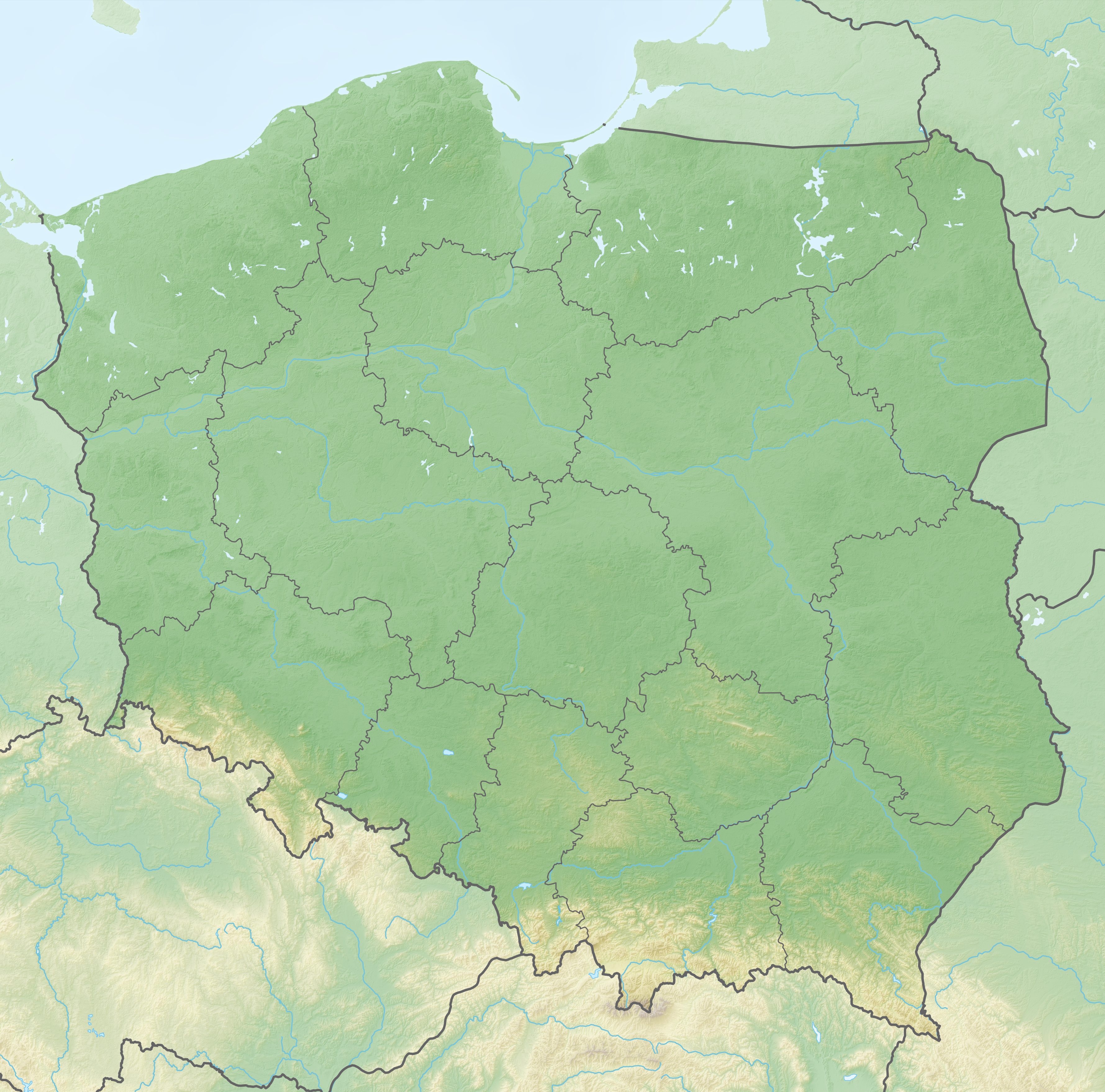 Reliefkarte Polen Topographischer Hintergrund: NASA Shuttle Radar Topography Mission (public domain). SRTM3 v.2. Grenzverläufe: File:Poland adm location map.svg